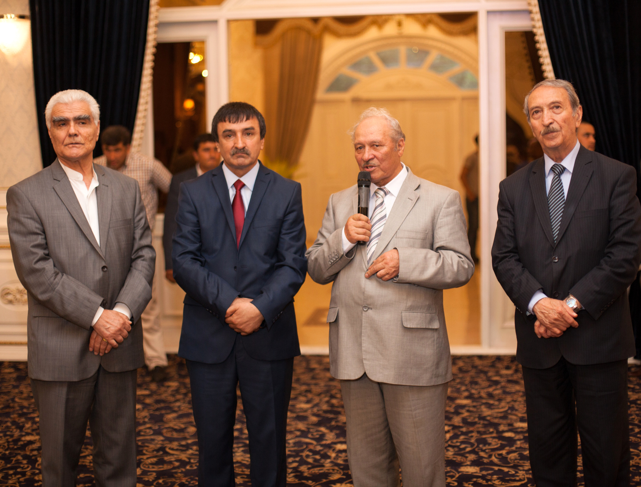 Тоҷикӣ: Бо адибон